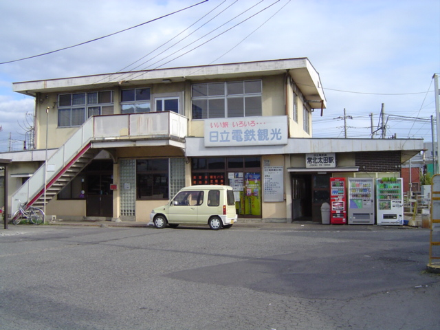 廃止前の常北太田駅 正面